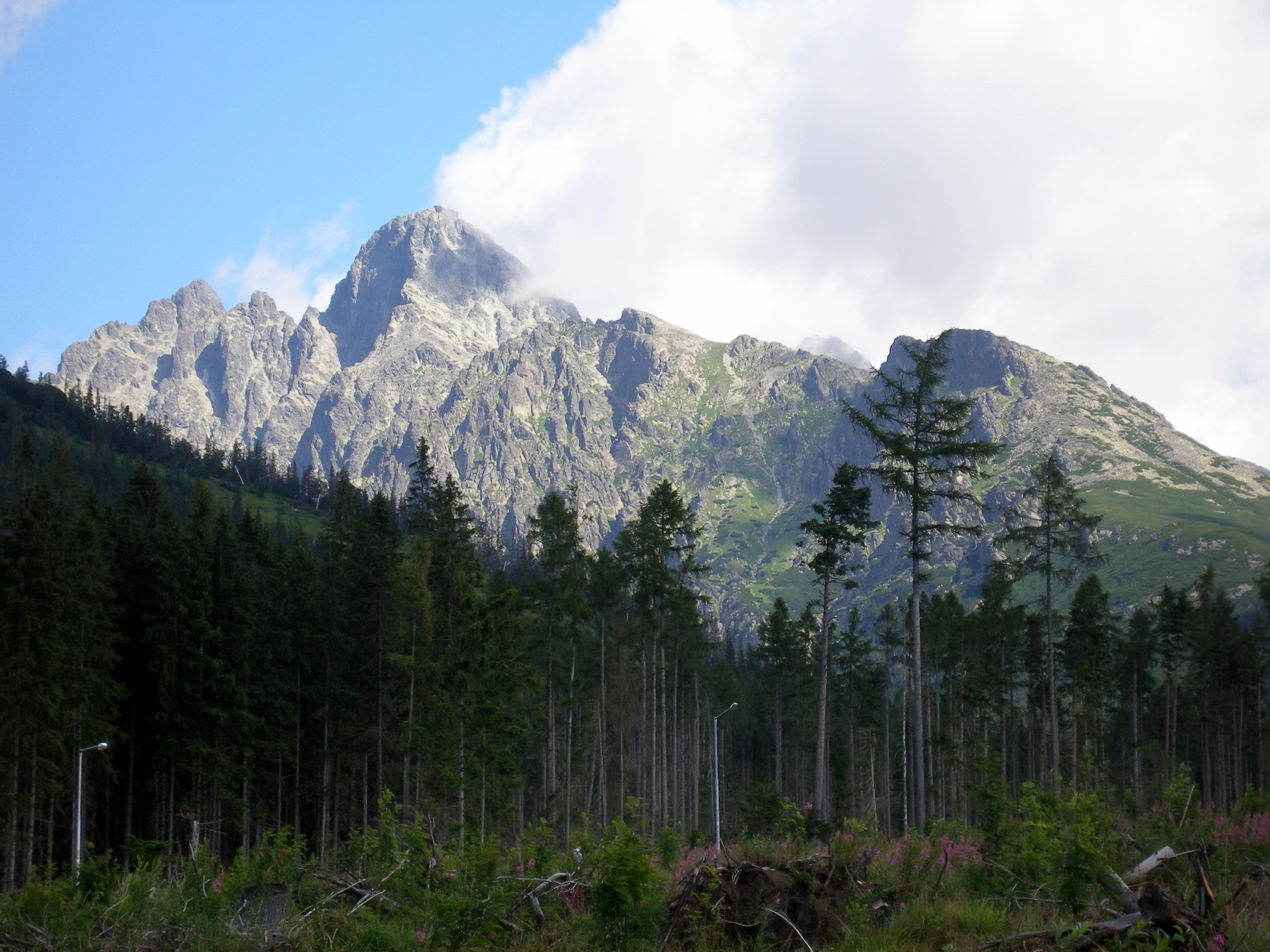 Pohľad z Hrebienka na Lomnický štít. Vysoké Tatry.